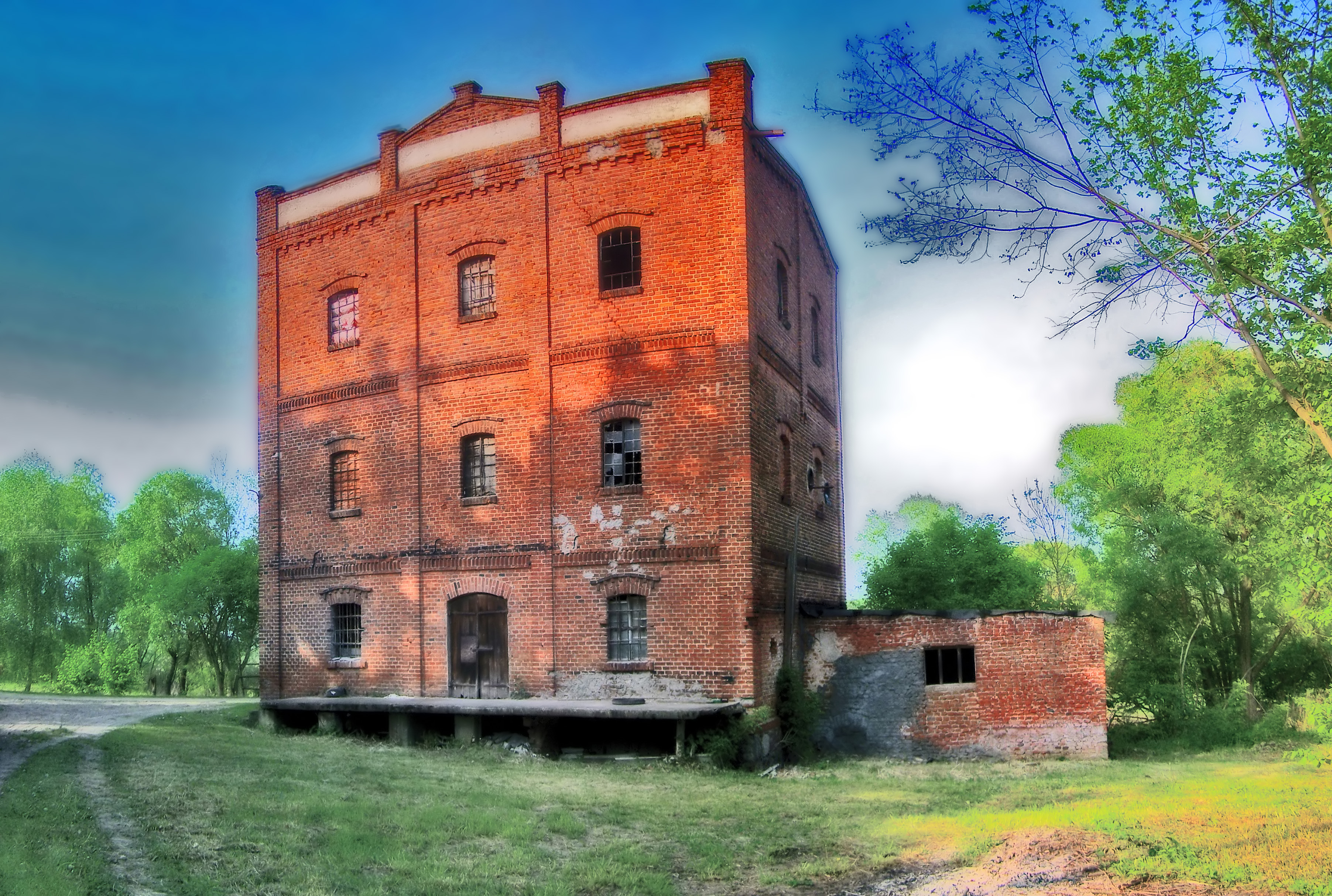 Młyn w Foluszu